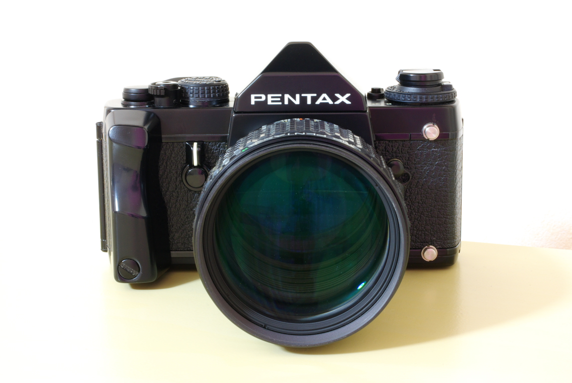 PENTAX LX